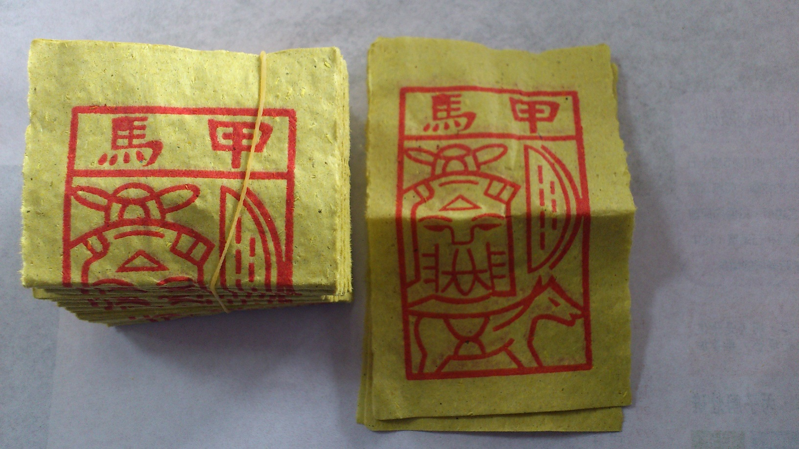 甲馬